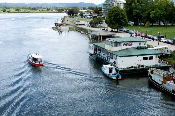 Vista opuesta a la clásica imagen de Valdivia.